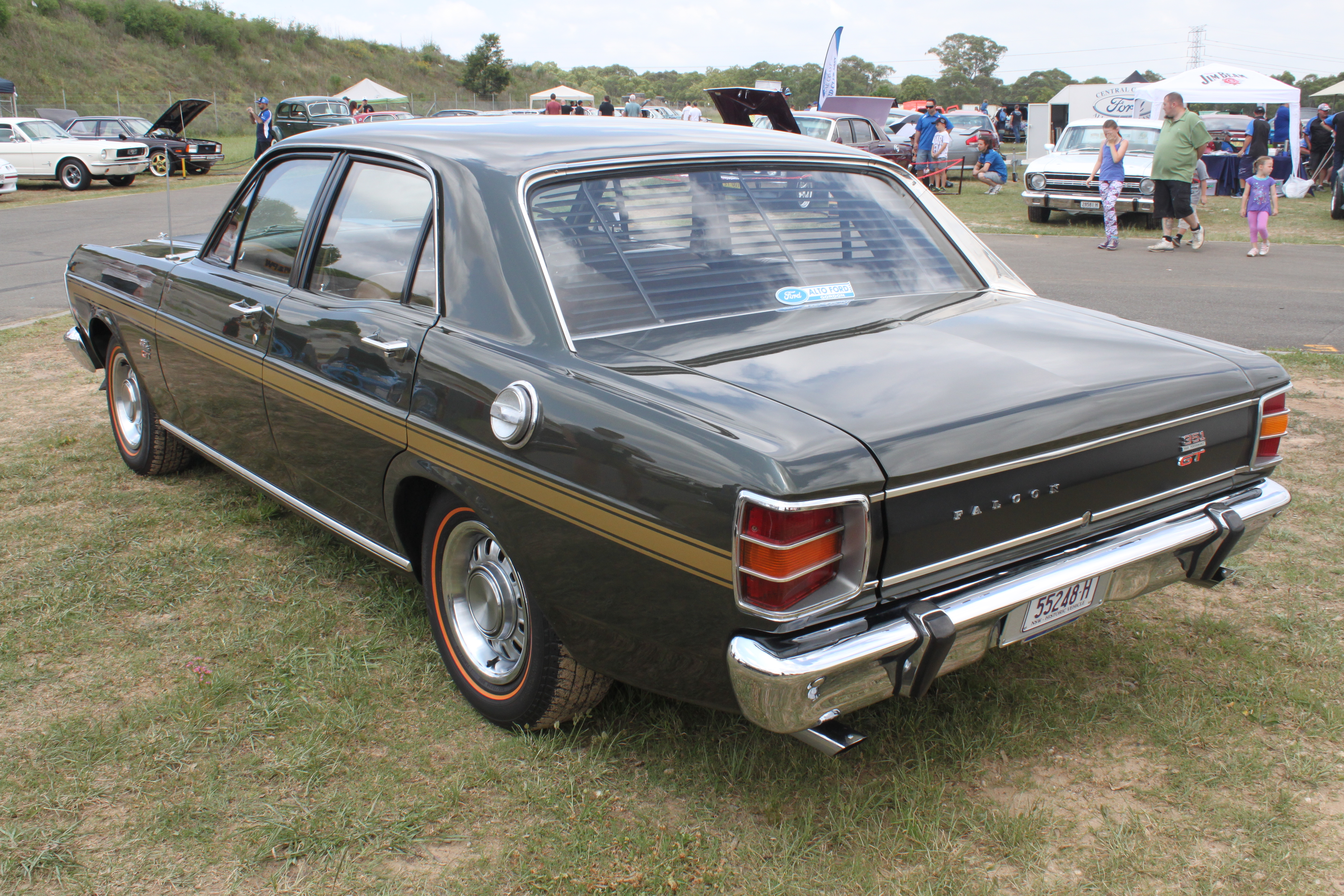 Ford Falcon XW GT